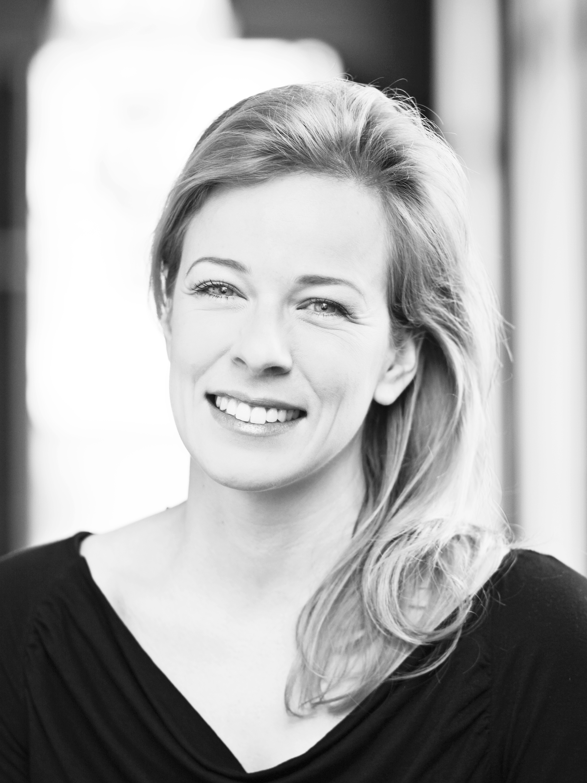 Portrait der deutschen Opernsängerin Cathrin Lange